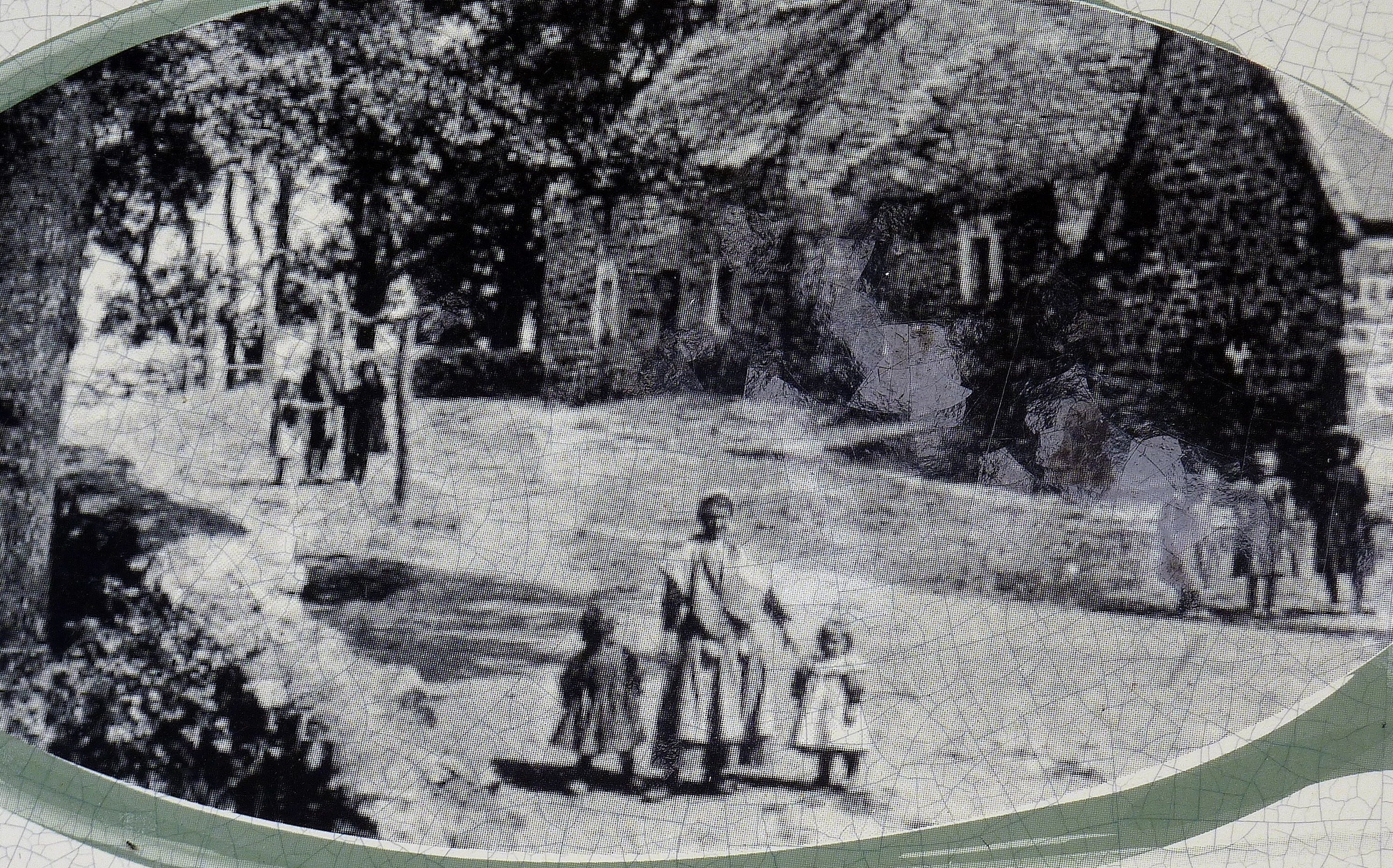 Douarnenez : photographie ancienne (vers 1900 ?) de l'ancien village des Plomarc'h